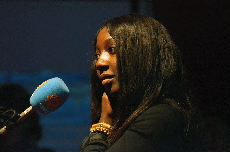 Pearl Jozefzoon.